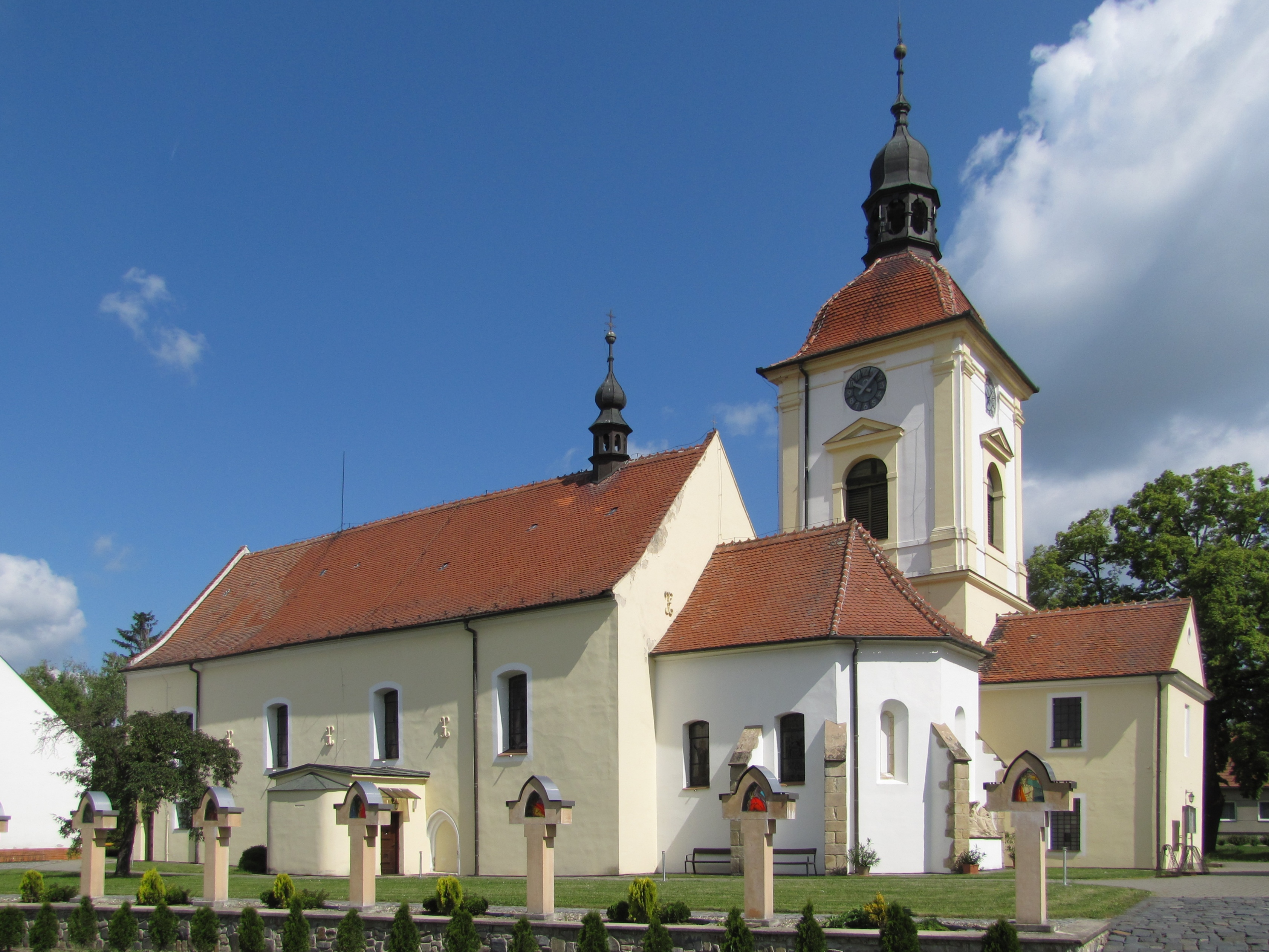 Kostel svatého Vavřince ve Vracově s křížovou cestou